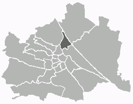 Positionskarte des 20. Wiener Gemeindebezirks Unter Verwendung einer Vorlage von Extrawurst. Public Domain.